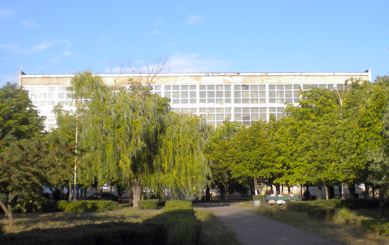 Басейн "Дельфін" на центральній площі міста Олександрія